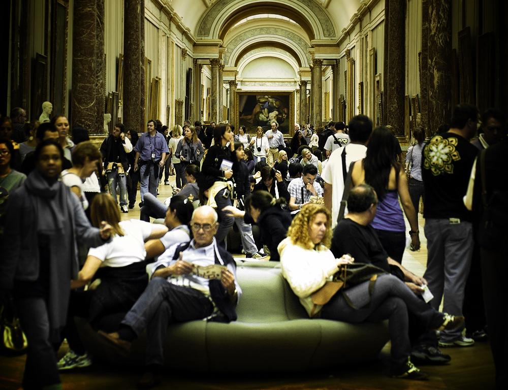 Louvre